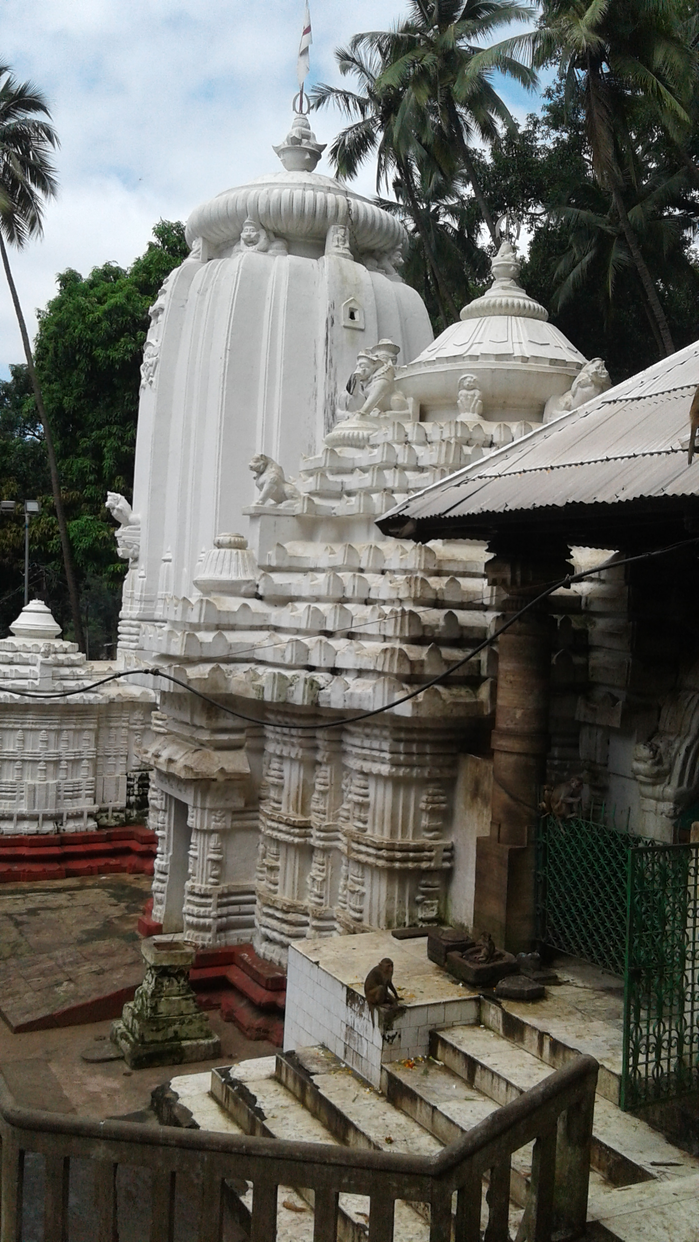 ଓଡ଼ିଆ: ଏହା ଓଡ଼ିଶାର ର ପ୍ରସିଦ୍ଧ ଶୈବ ପୀଠ।